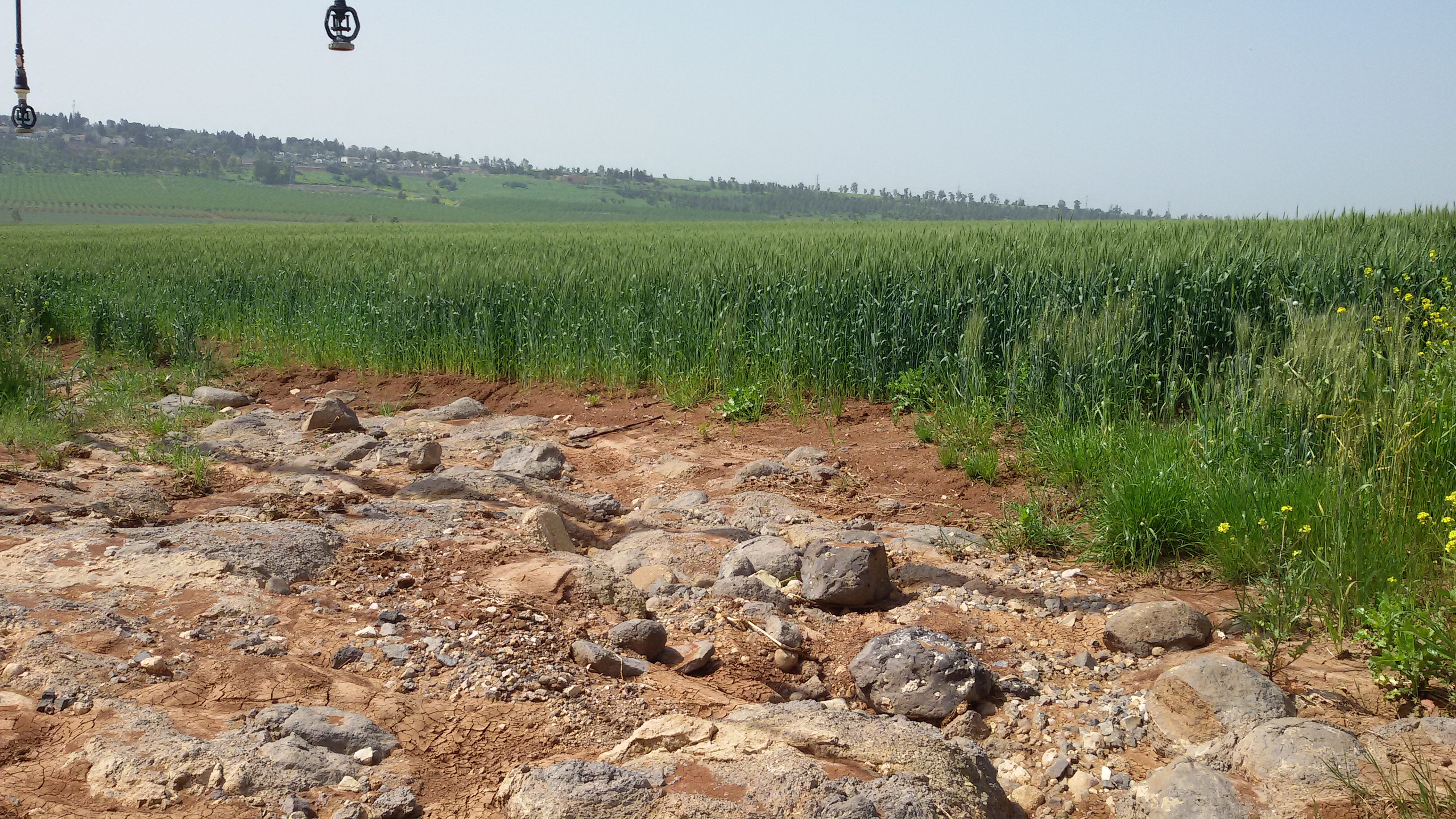 חשיפת סלע אב בשדות